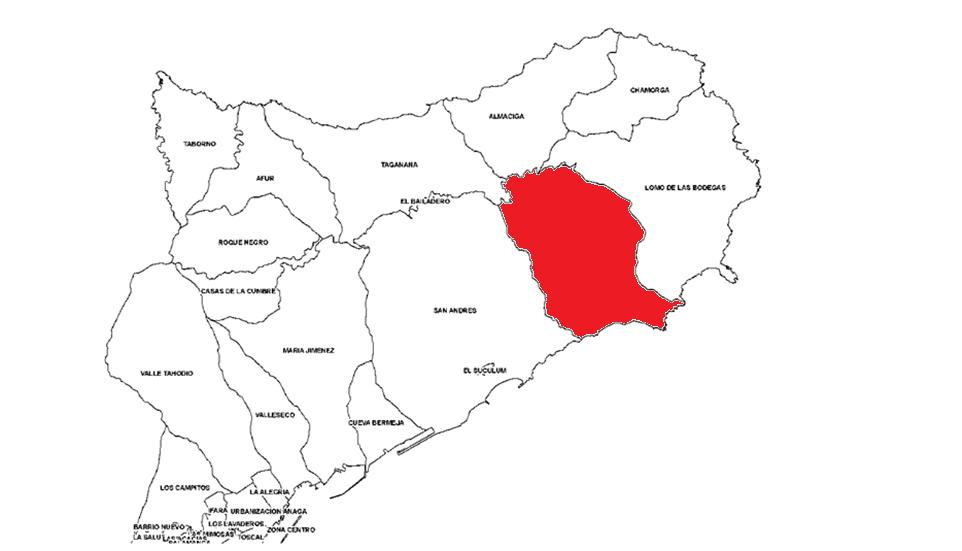 Localización de Igueste de San Andrés